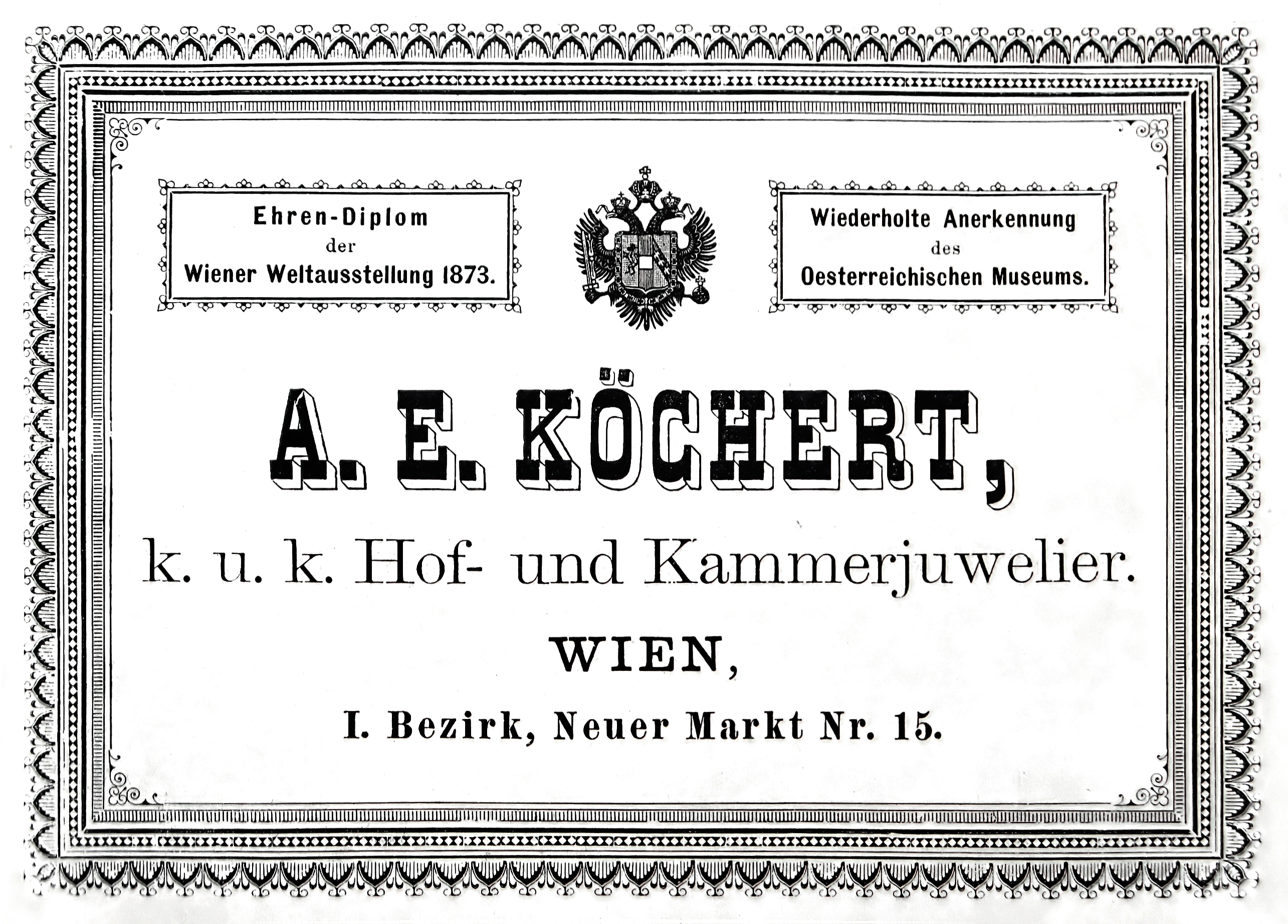 Werbung von A. E. Köchert im Handbuch des Allerhöchsten Hofes und des Hofstaates Seiner K. und K. Apostolischen Majestät für 1891. Licensing thumb|Original Uploaded with Reworkhelper thumb|Original Uploaded with Reworkhelper